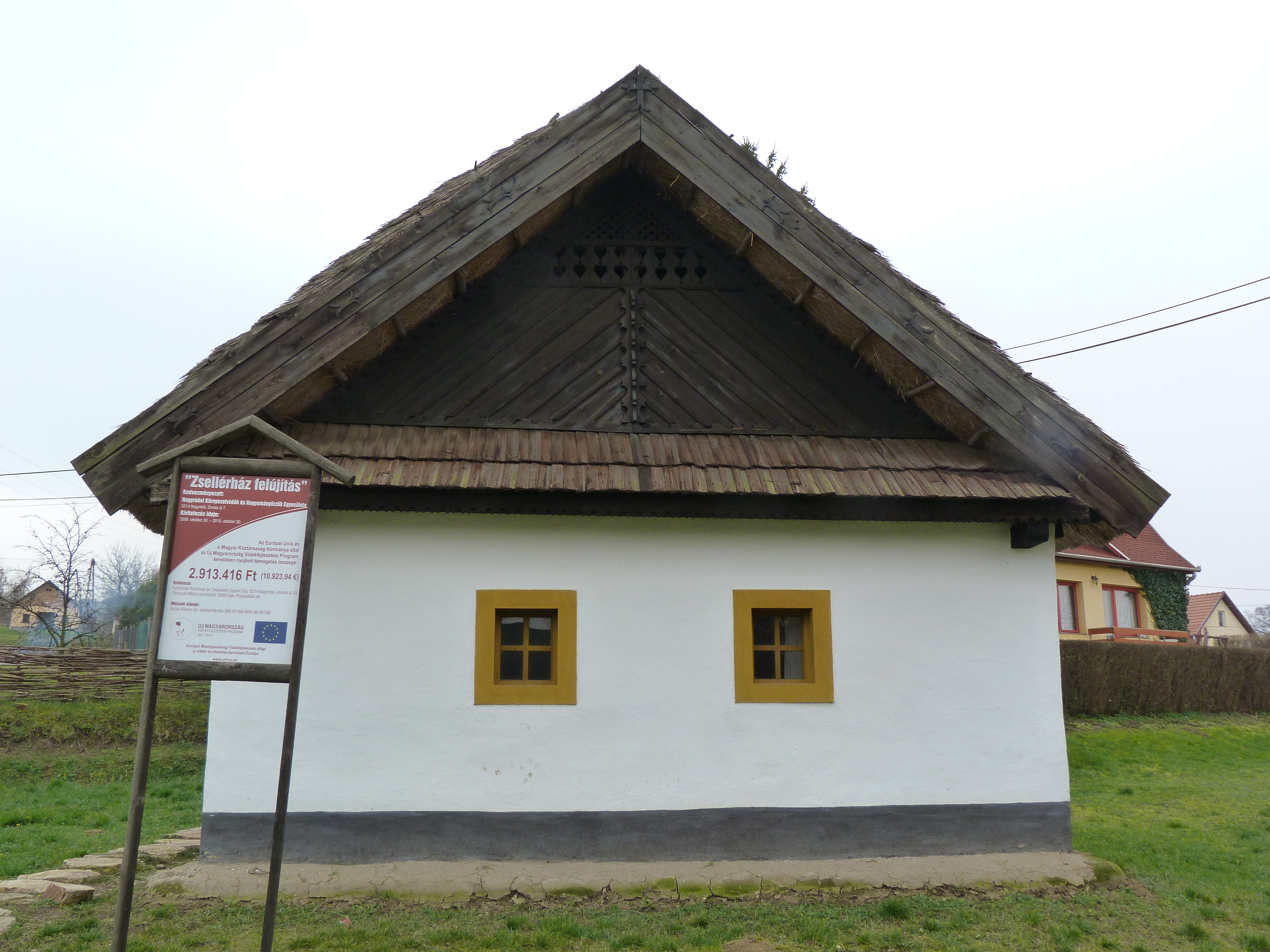 A felvétel 2014. február 28 -án készült Nagyrédén. Zsellérház. ©© Derzsi Elekes Andor, Budapest, 2014, You are authorised to use these photos and vids under Creative Commons – even for commercial, for profit purposes. Photos must be attributed to Derzsi Elekes Andor. All of the photos and vids in the Metapolisz DVD line are under Creative Commons and can be used even for commercial – for profit – purposes. Recommended Citation Derzsi Elekes Andor: Metapolisz DVD line